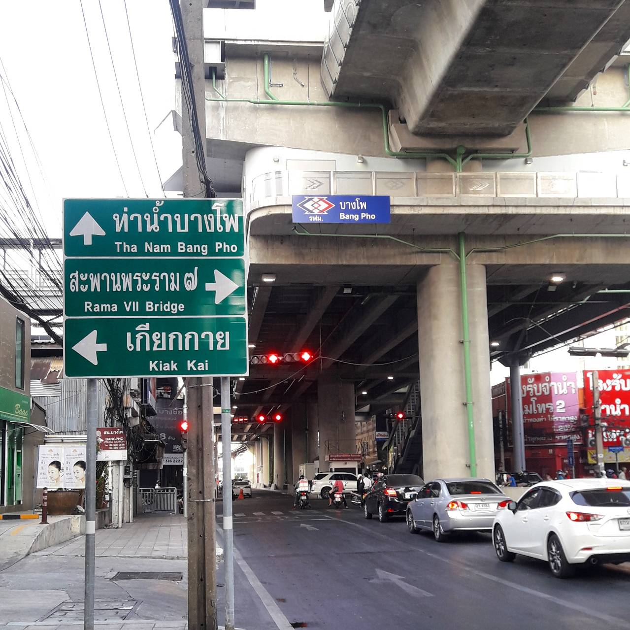 แยกบางโพ จากฝั่งถนนประชาราษฎร์สาย 2